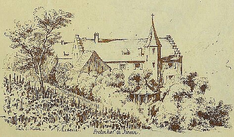 Der Frohn- oder Dinghof in Istein - auch als Freystedts Schlösschen bekannt